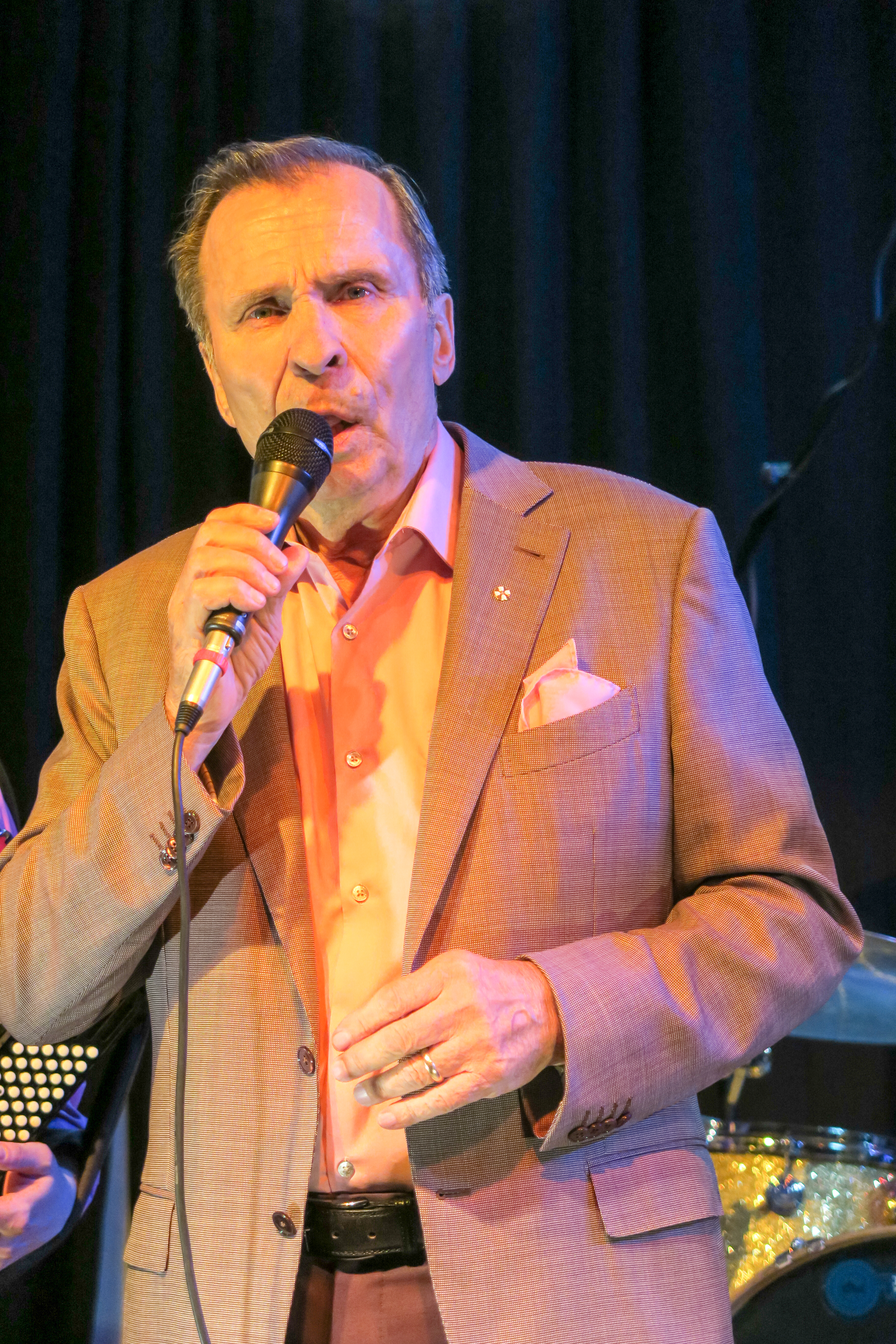 Reijo Taipale, suomalainen laulaja